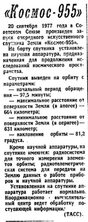 TASS report on Soviet satellite Kosmos-955